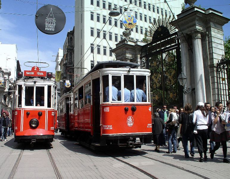 Türkiye İstanbul nostalji iki tramvay karşılaşması